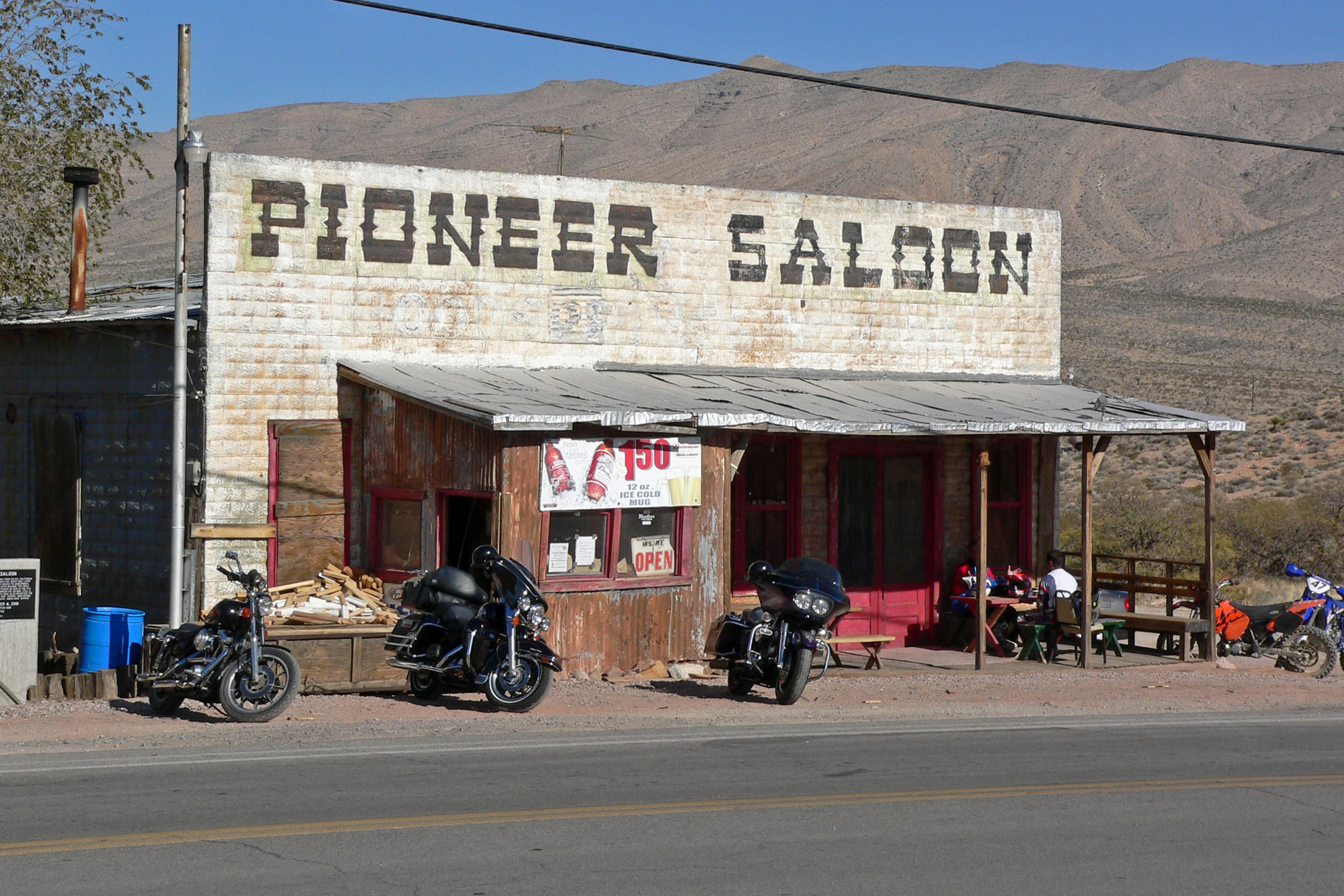 View of Pioneer Saloon, Goodsprings, Nevada